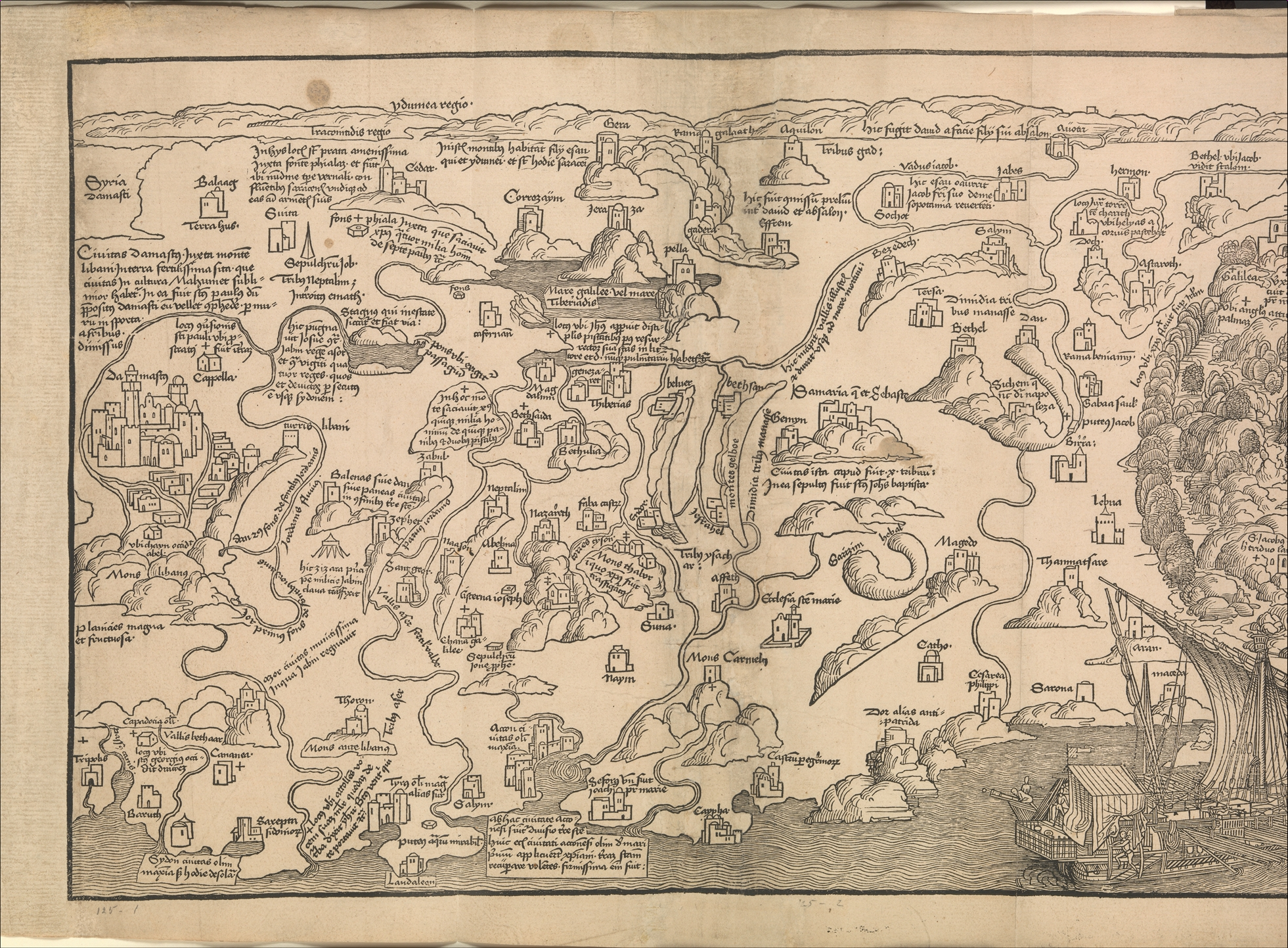 Book; Books